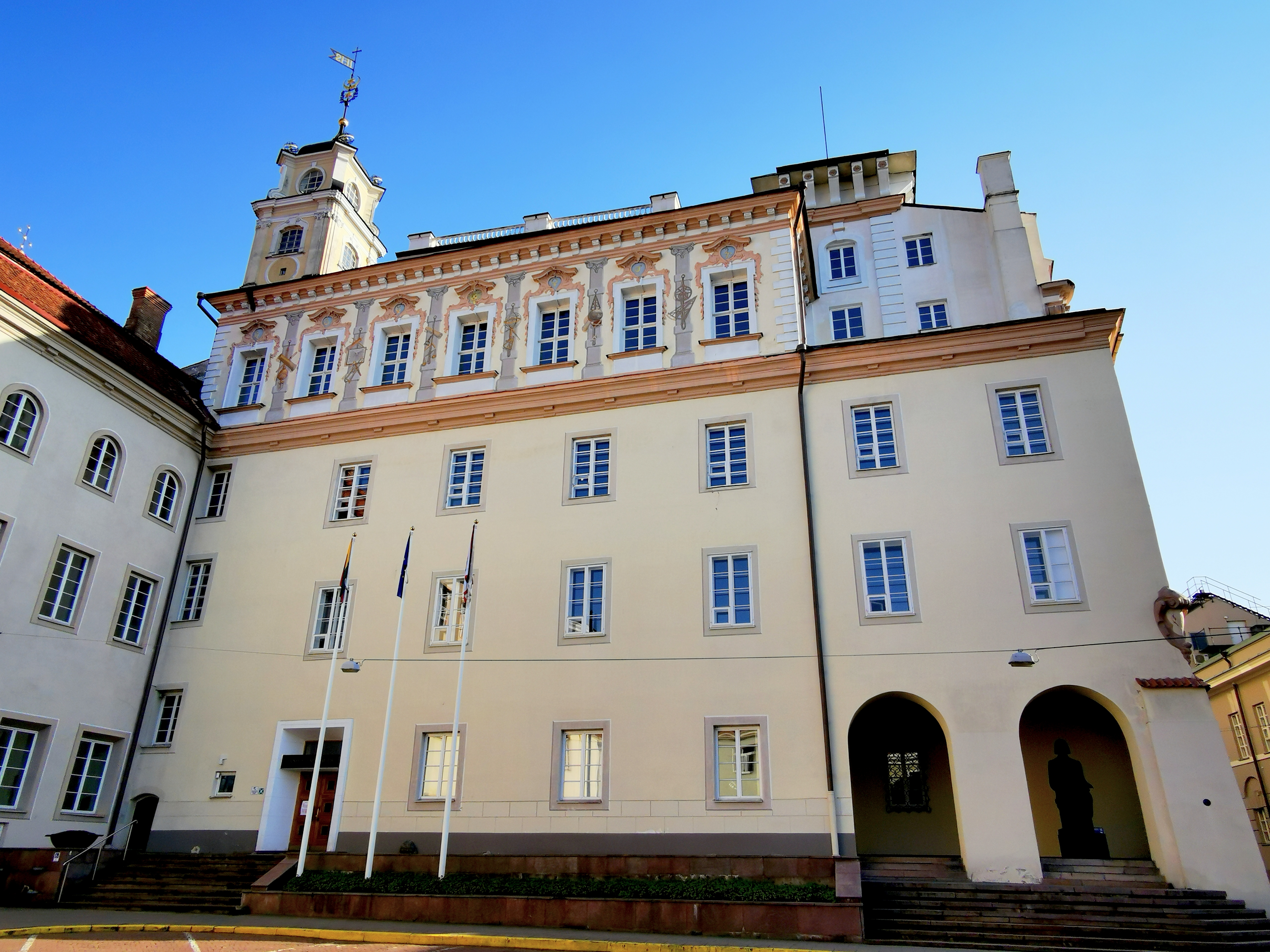 Universiteto gatvė. Pagrindiniai VU rūmai